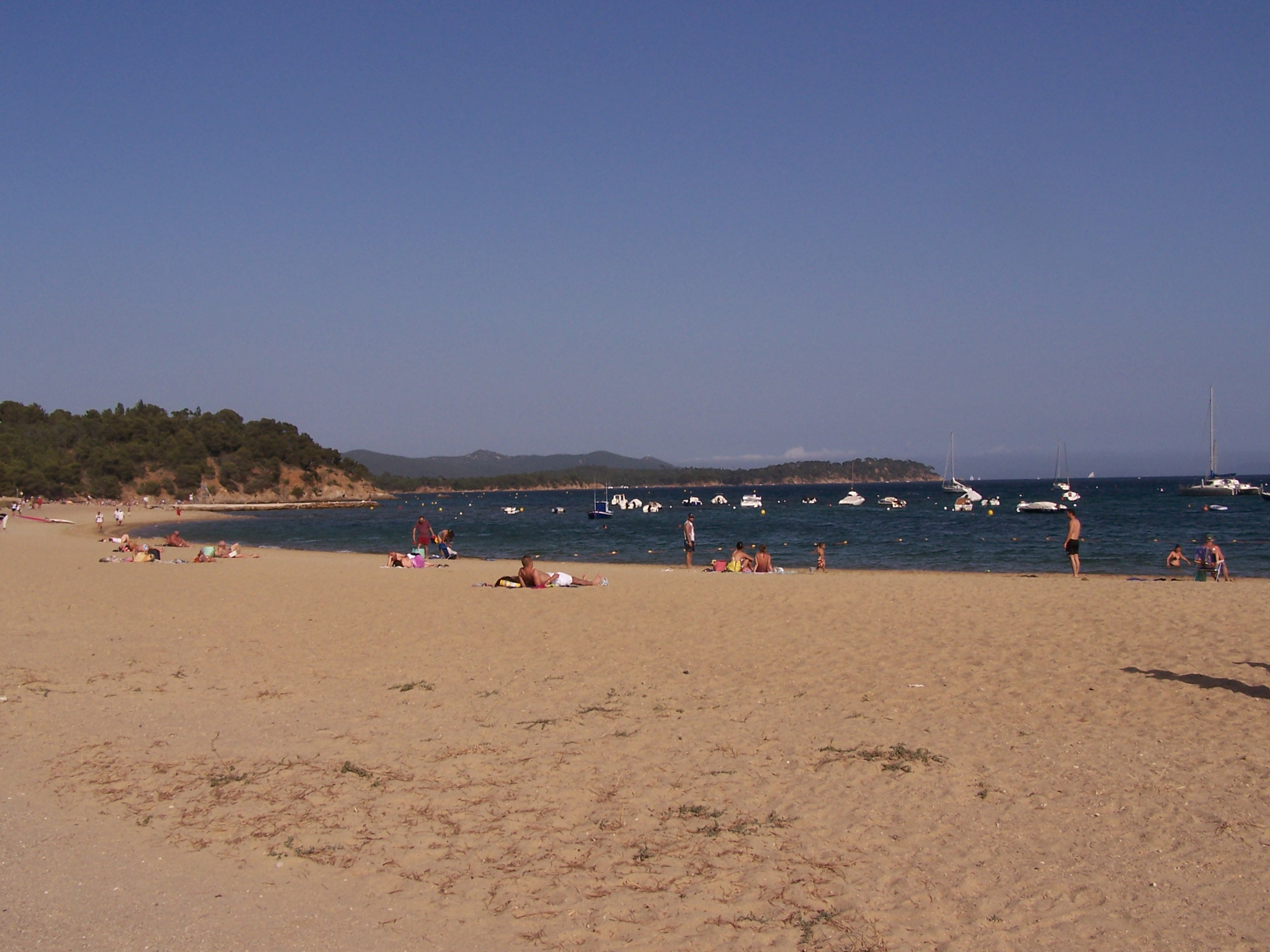 Plage de l'Argentière, La Londe (France)